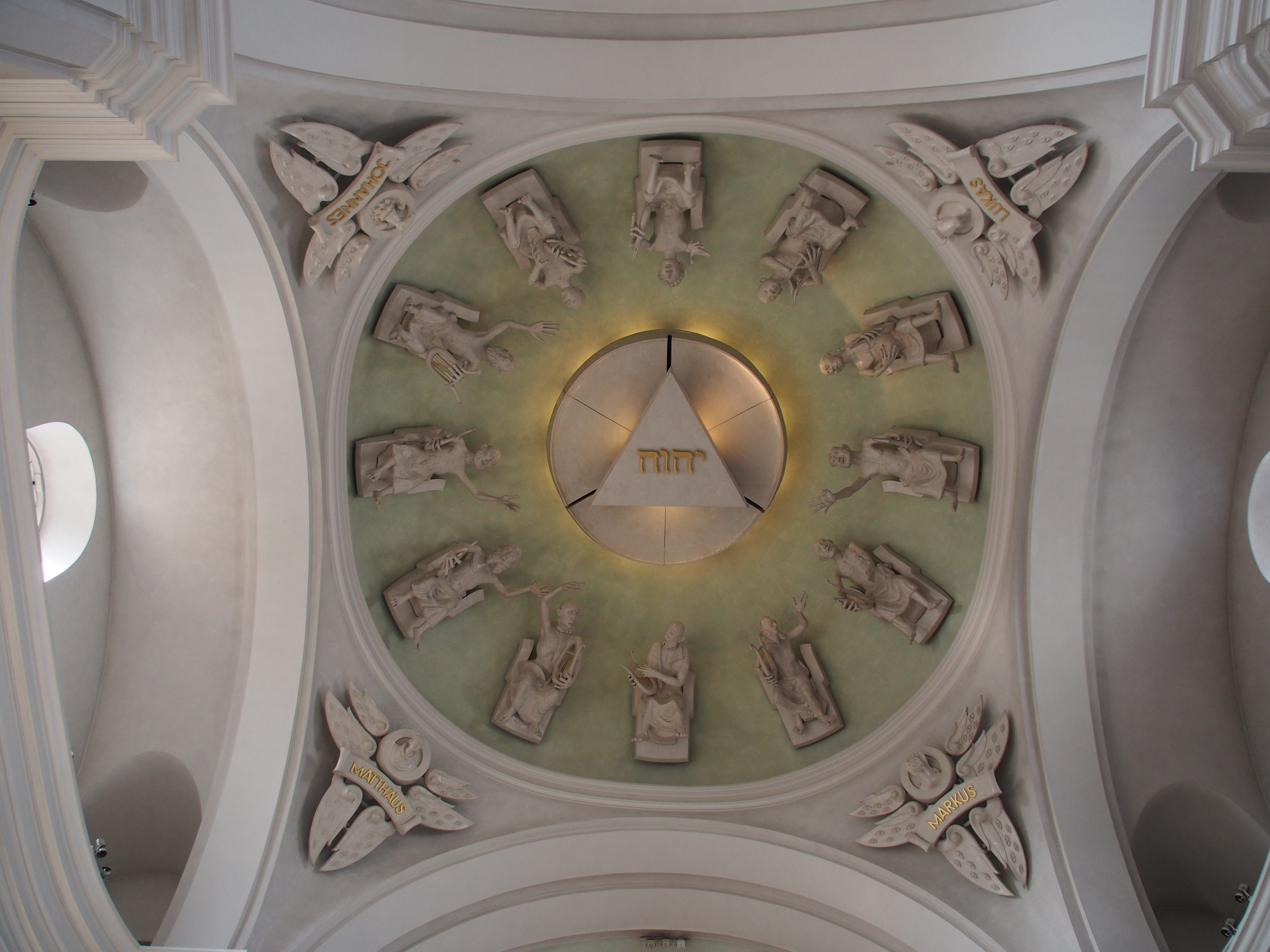 Kuppel der Kirche St. Michael, Würzburg